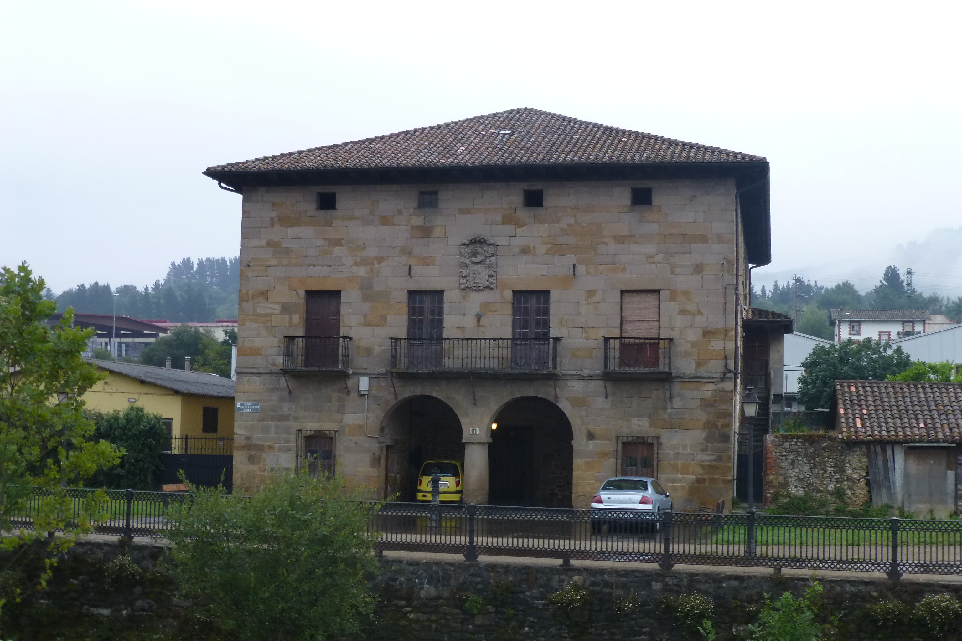 Laudio (Araba)